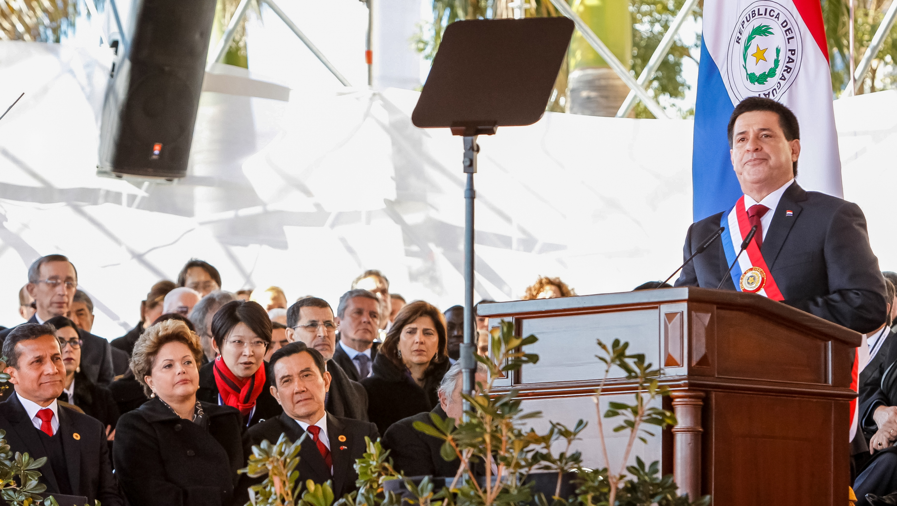 El presidente paraguayo Horacio Cartes, da su primer discurso como jefe de estado. A la izquierda se distinguen los mandatarios Dilma Rousseff y Ollanta Humala.